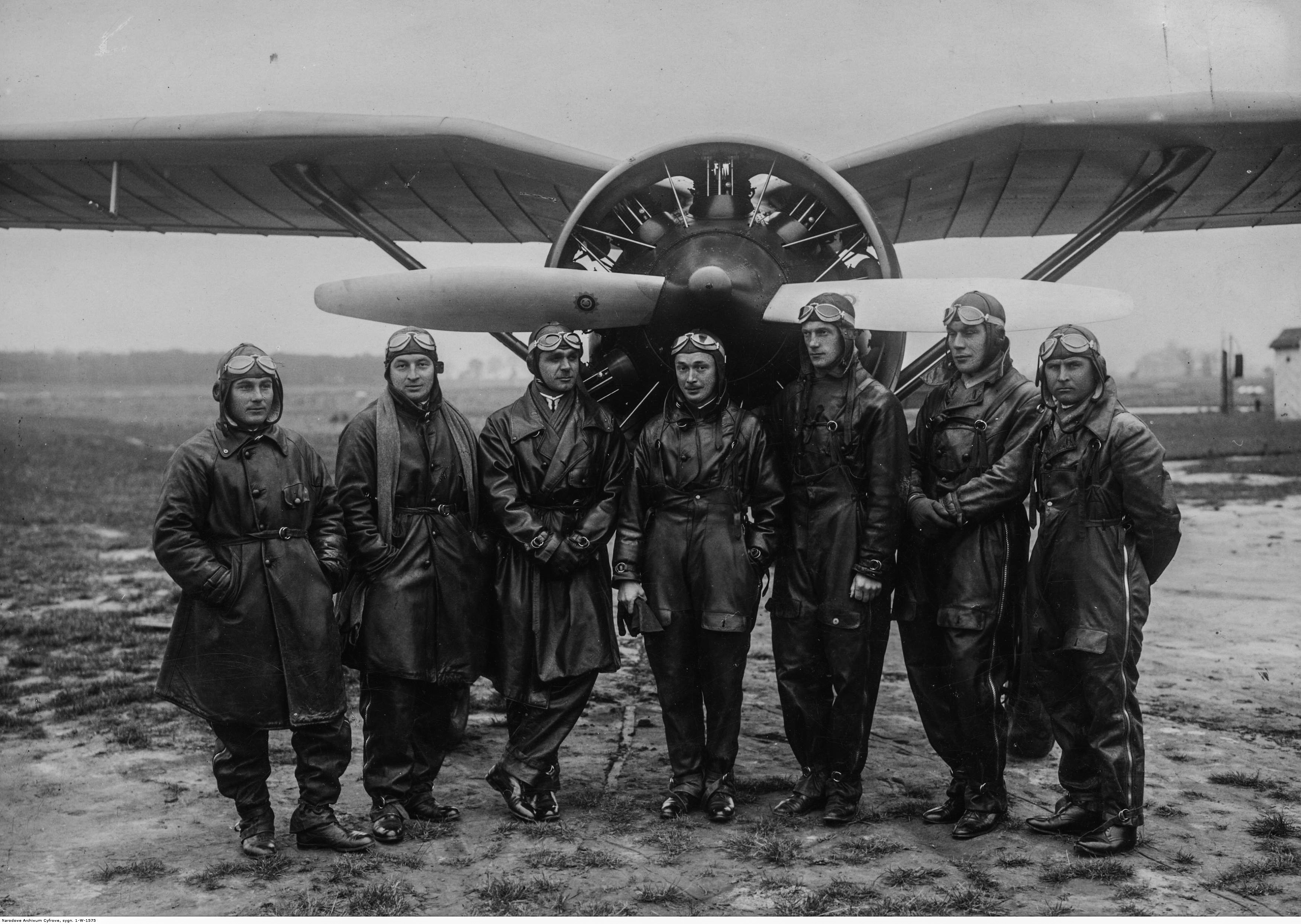 Lotnicy 2 pułku lotnictwa w Krakowie na tle samolotu PZL-7 po powrocie z rajdu lotniczego do Rumunii. Od lewej: por. Antoni Wczelik, por. Jan Czerny, kpt. Kazimierz Niedźwiedzki, kpt. Jerzy Bajan, kpr. Karol Pniak, por. Bronisław Kosiński, kpr. Stanisław Macek. Koncern Ilustrowany Kurier Codzienny - Archiwum Ilustracji. Sygnatura: 1-W-1575